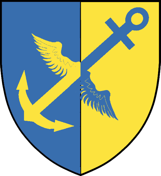 Vapensköld för adelsätten Ankarswärd